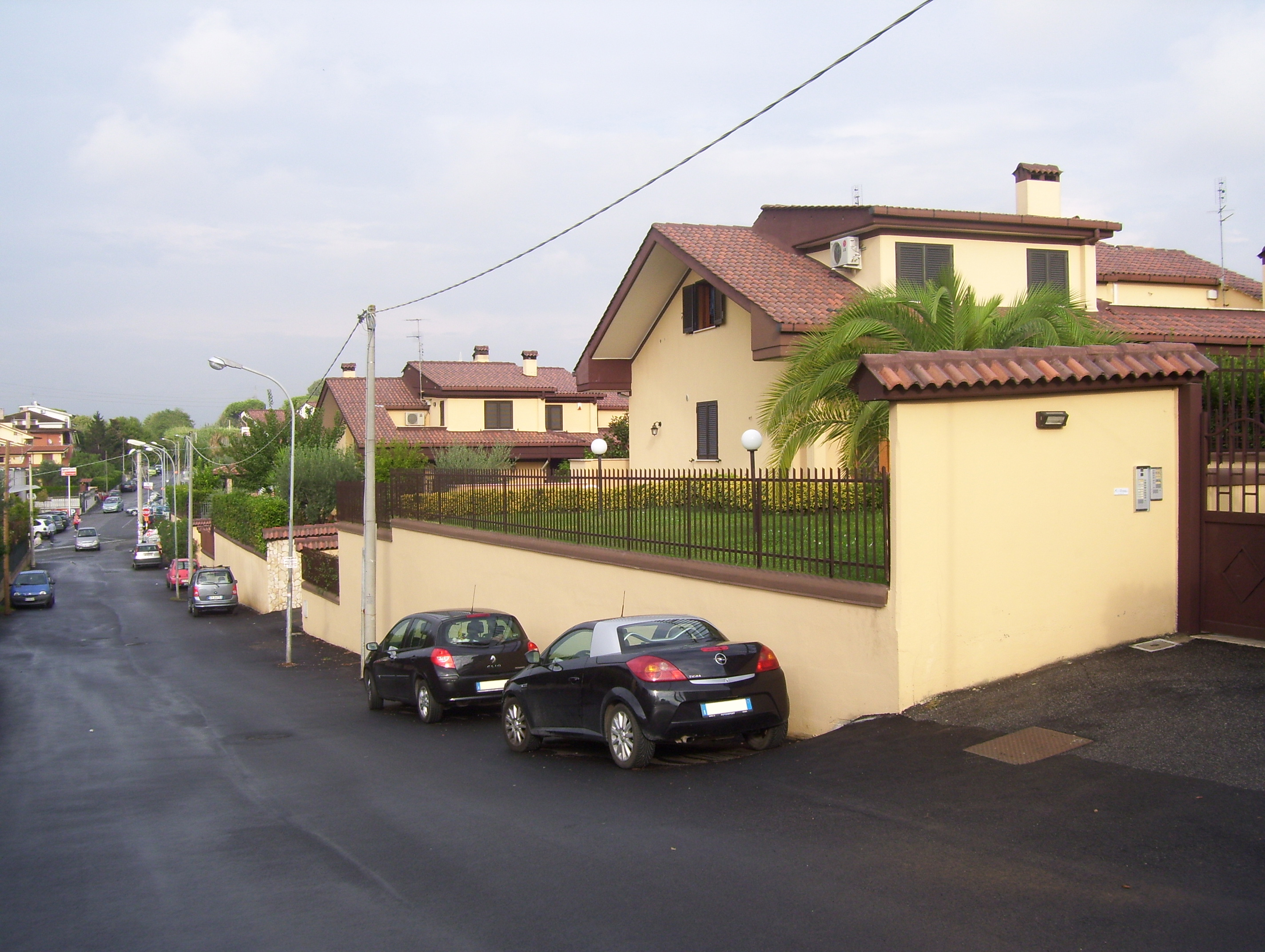 Villette in Setteville Nord di Guidonia. (Foto ritoccata per omettere le targhe delle automobili)